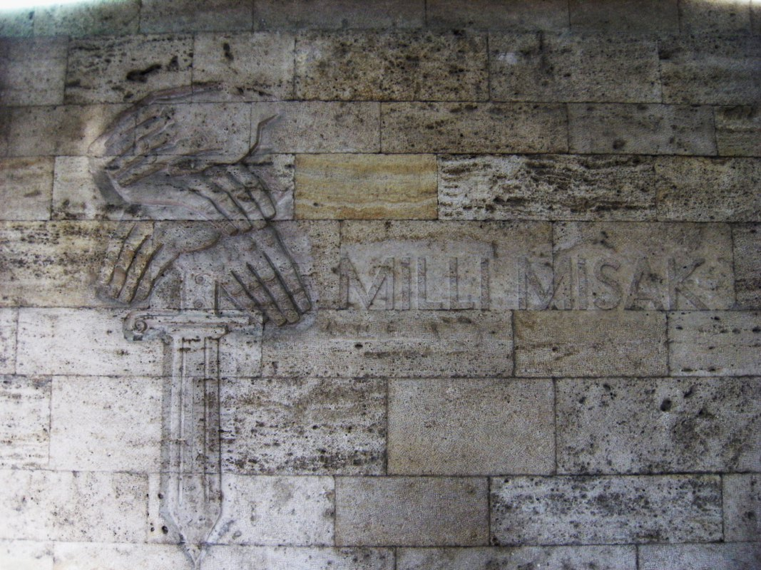 Anıtkabir rölyefi